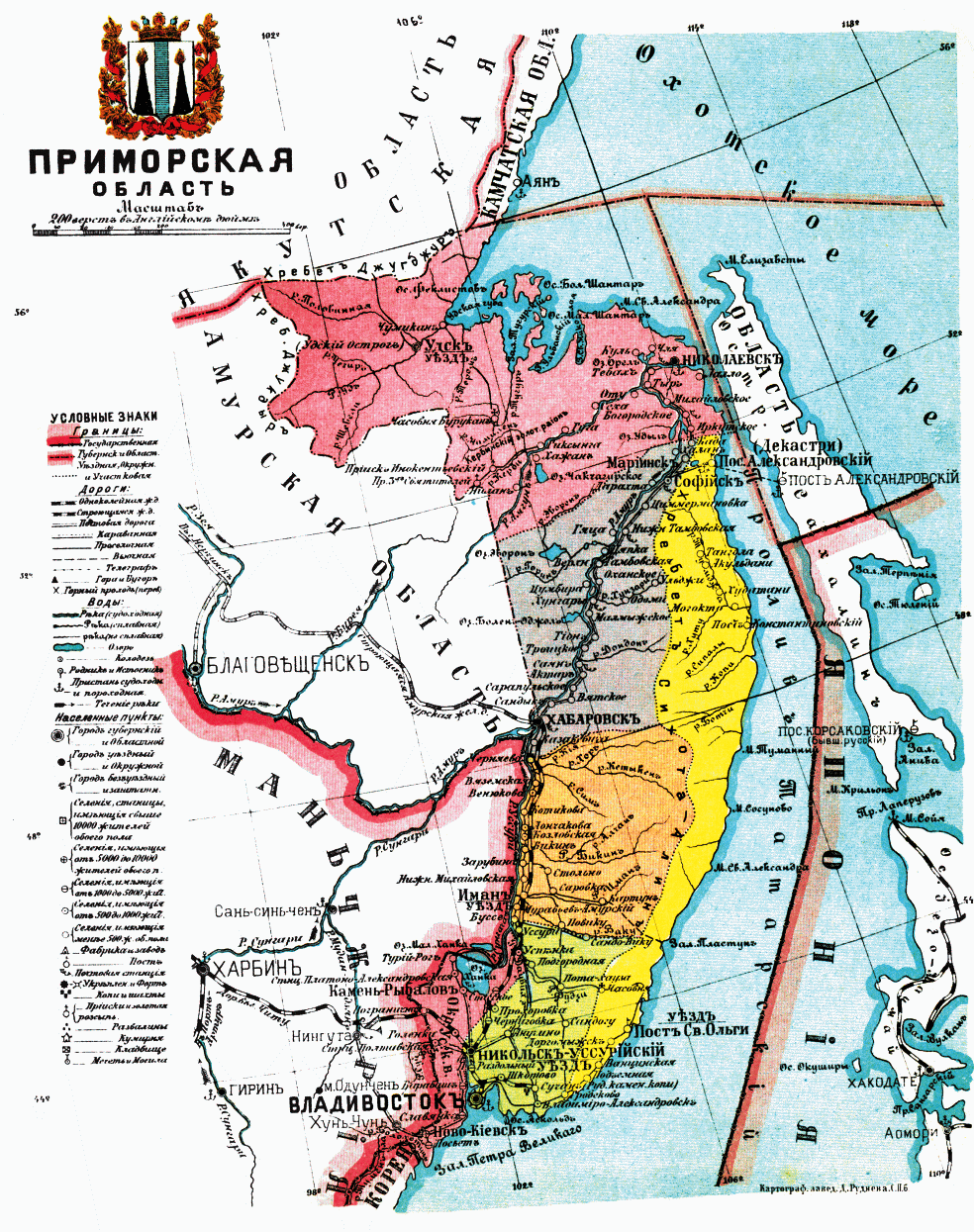 Карта Приморской области, 1913